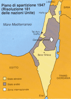 Israele, Piano di spartizione dell'ONU, 1947 Fonte